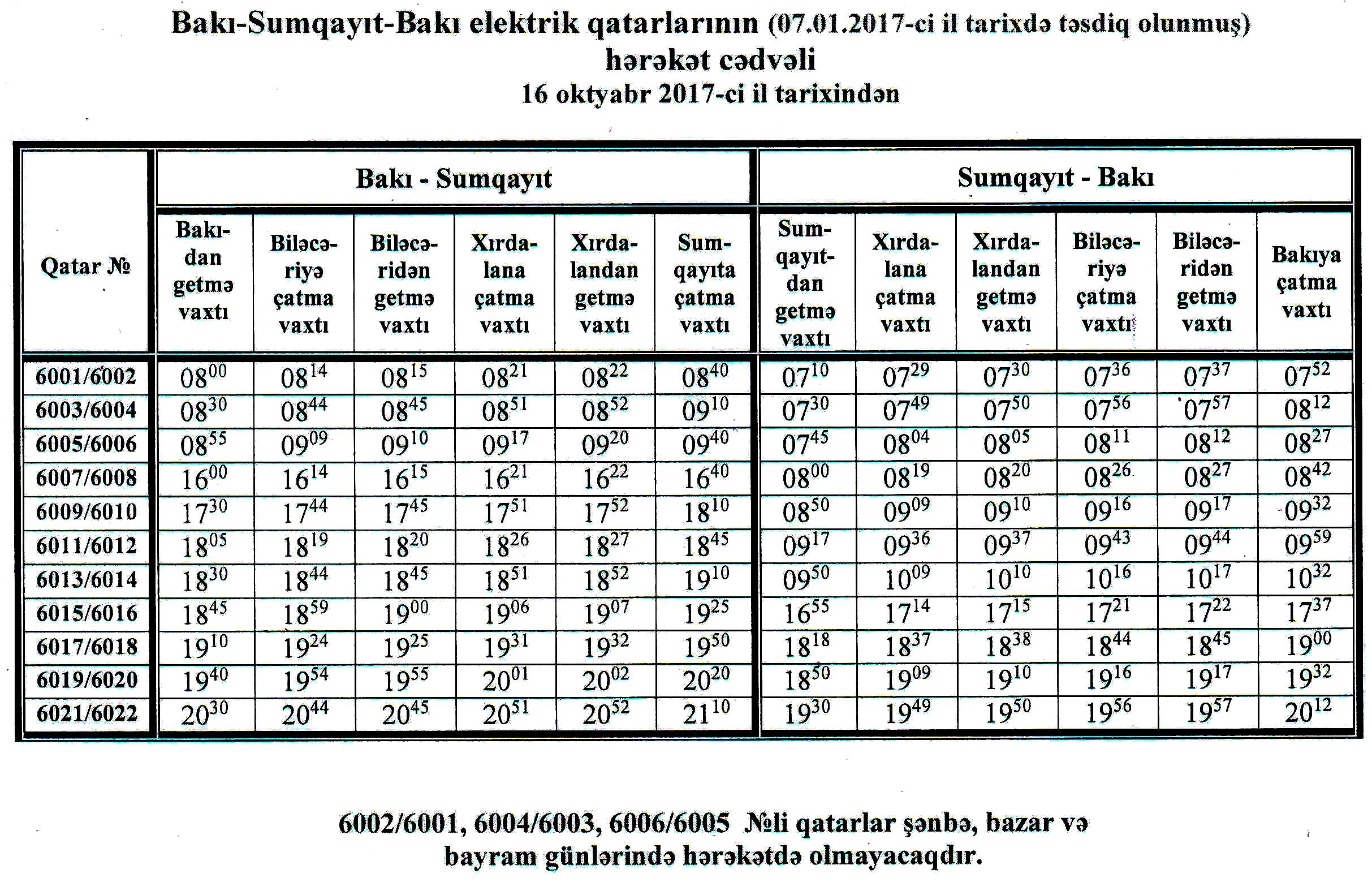 Bakı-Sumqayıt qatarının hərəkət cədvəli